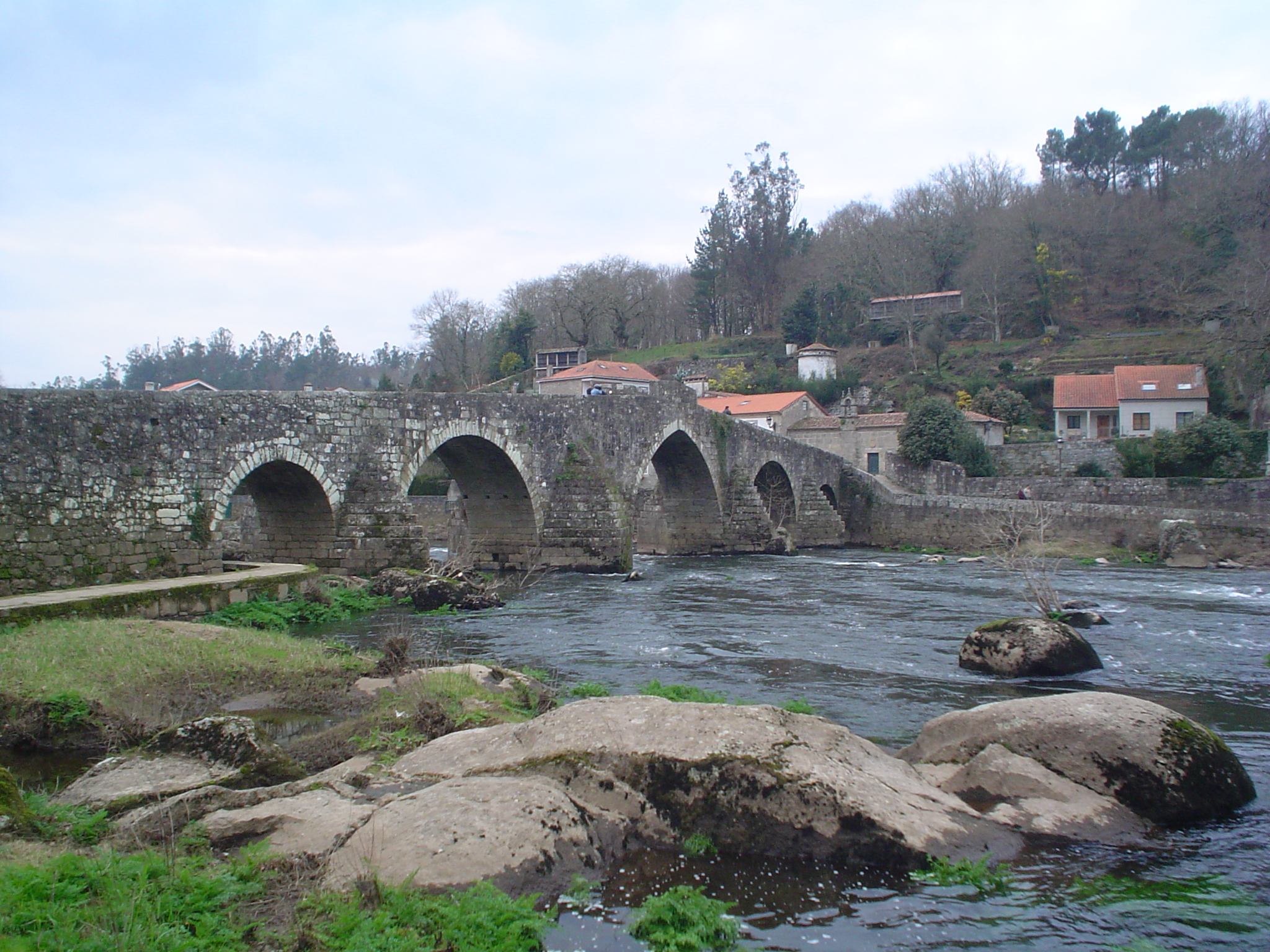 Ponte Maceira - Concello de Ames - A Coruña. Ponte Medieval. Licensing Categoría:Imaxes da semana Categoría:Imaxes de Negreira